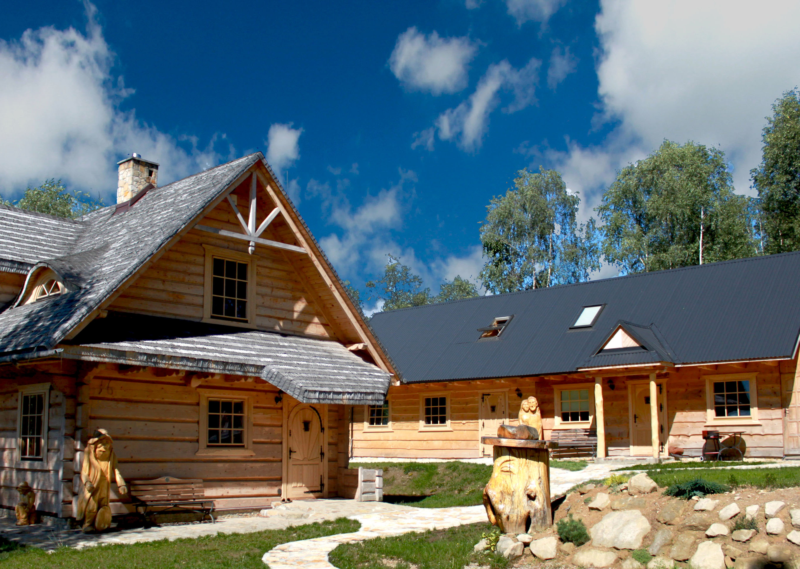 Chatka Włóczykija